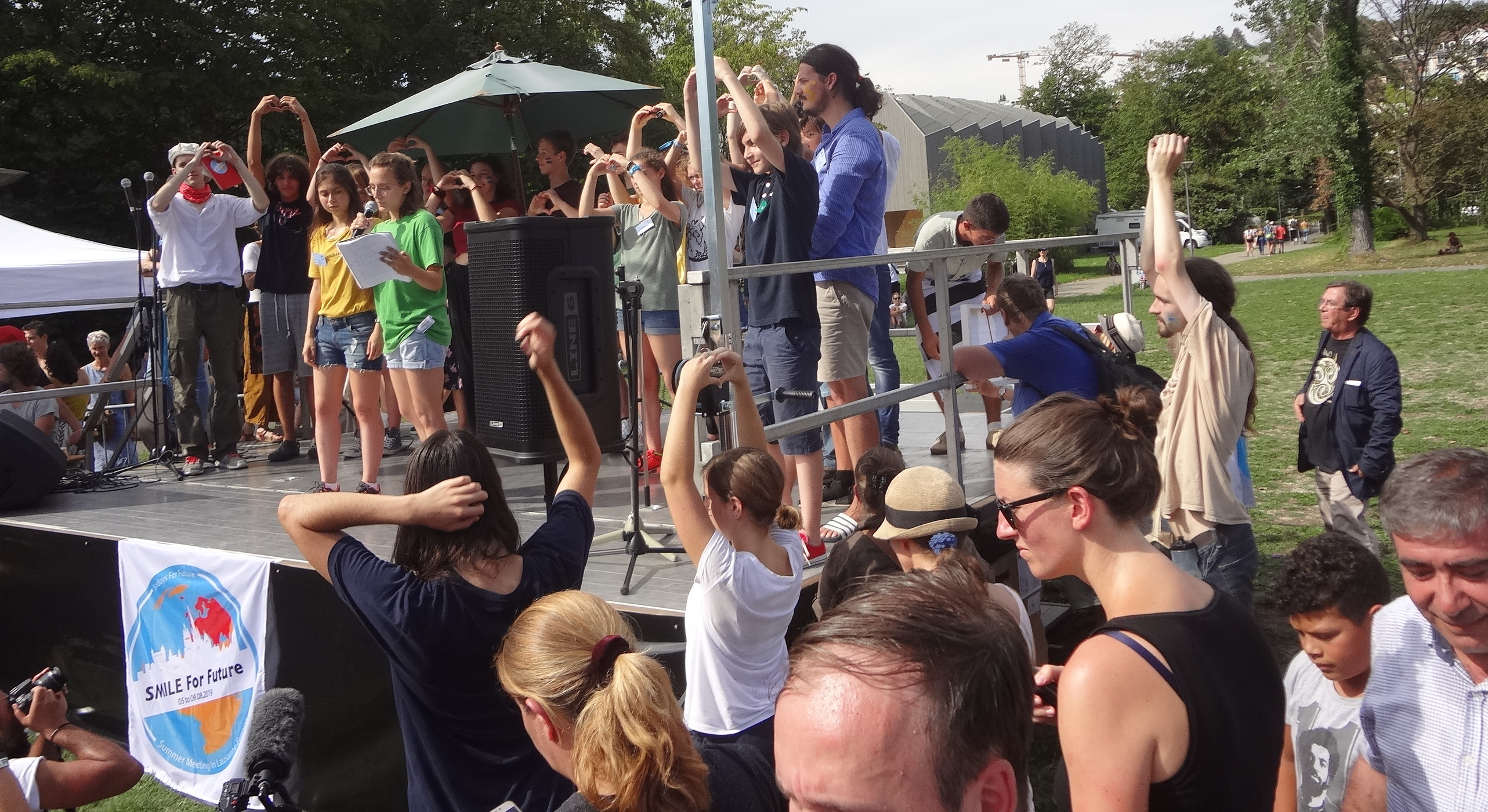 Manifestation pour le climat, Lausanne. Dernier jour de la rencontre du mouvement Fridays for Future (vendredis pour l'avenir) réunissant des membres de plus de 37 pays lors du Summer Meeting in Lausanne Europe, ou SMILE for Future 5-9 août 2019. Rassemblement à Vidy.